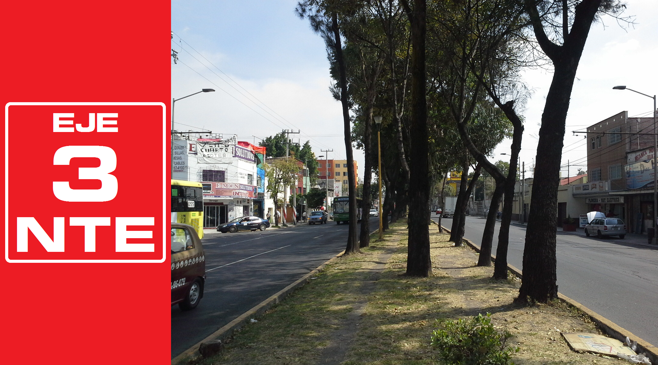 Rediseñado original de la señalética de los Ejes viales de la Ciudad de México por José García (Wiki ID: narumiyama)